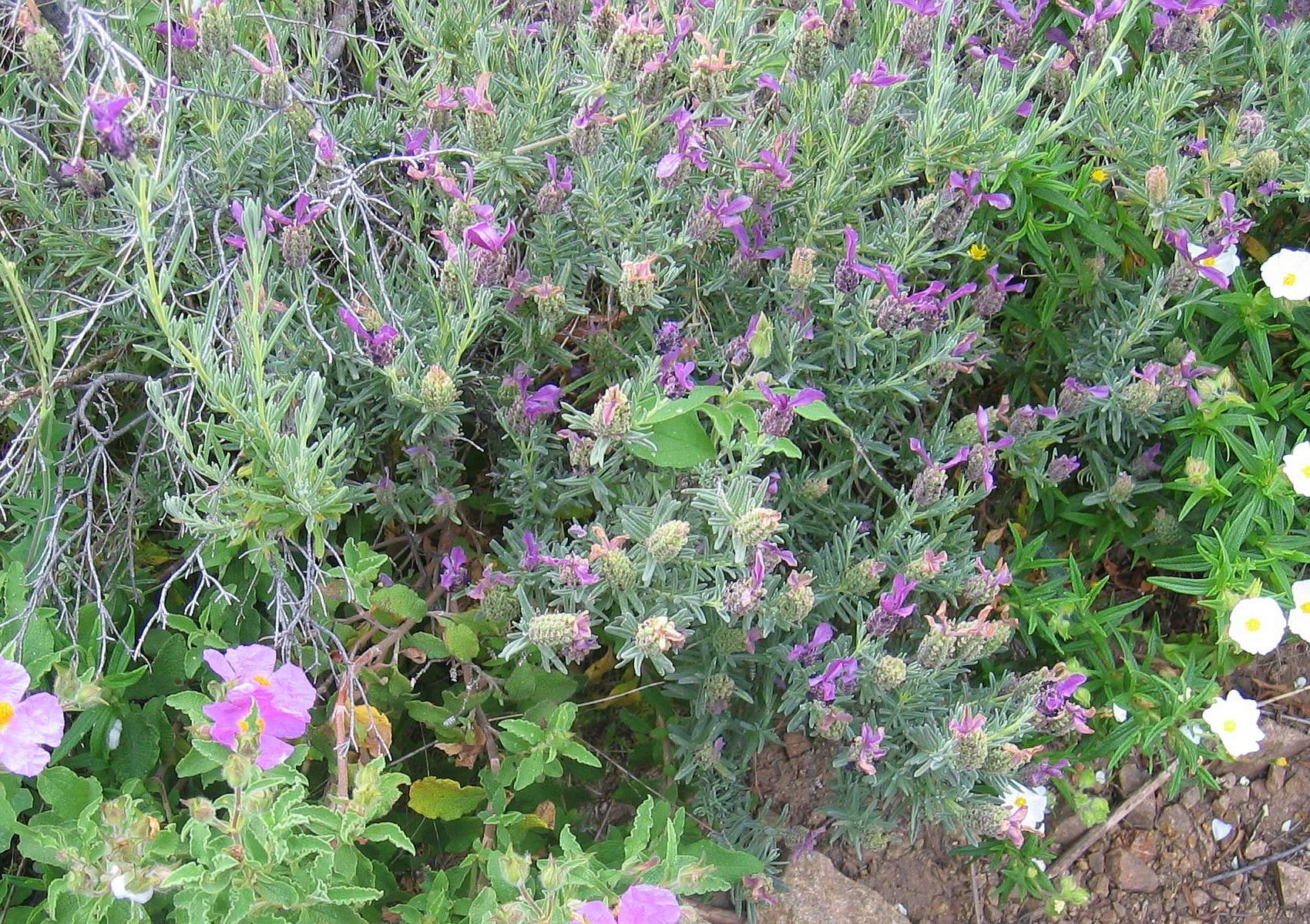 Lavandula stoechas, Lamiaceae - Calvi, Corse, France, in macchia